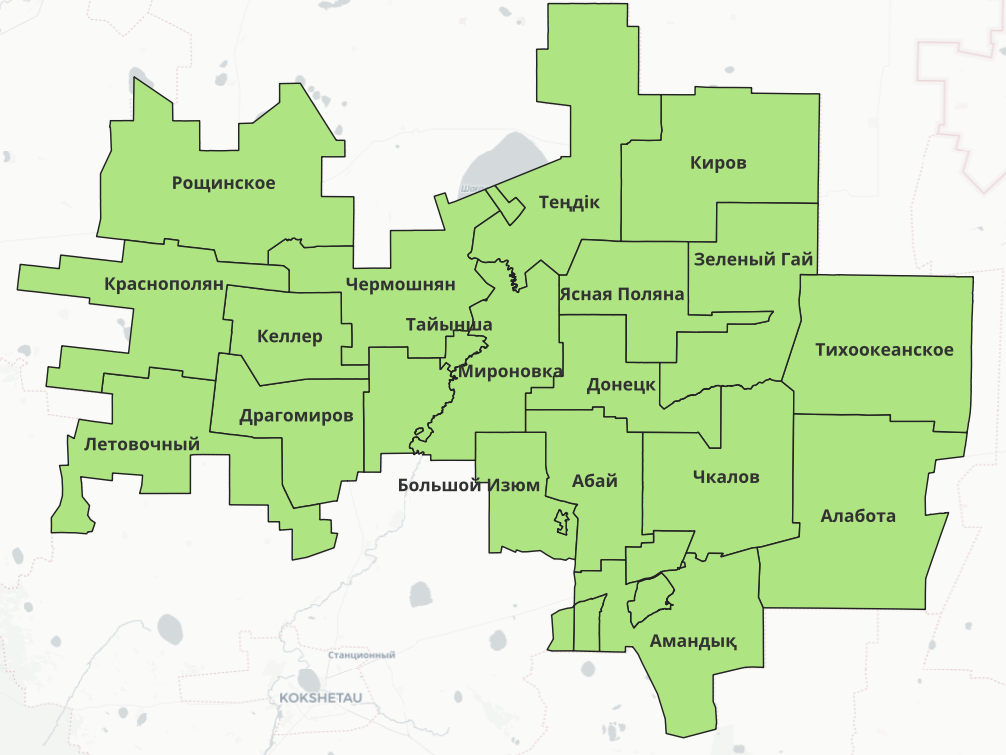 Схема АТП Тайиншинського району Північно-Казахстанської області